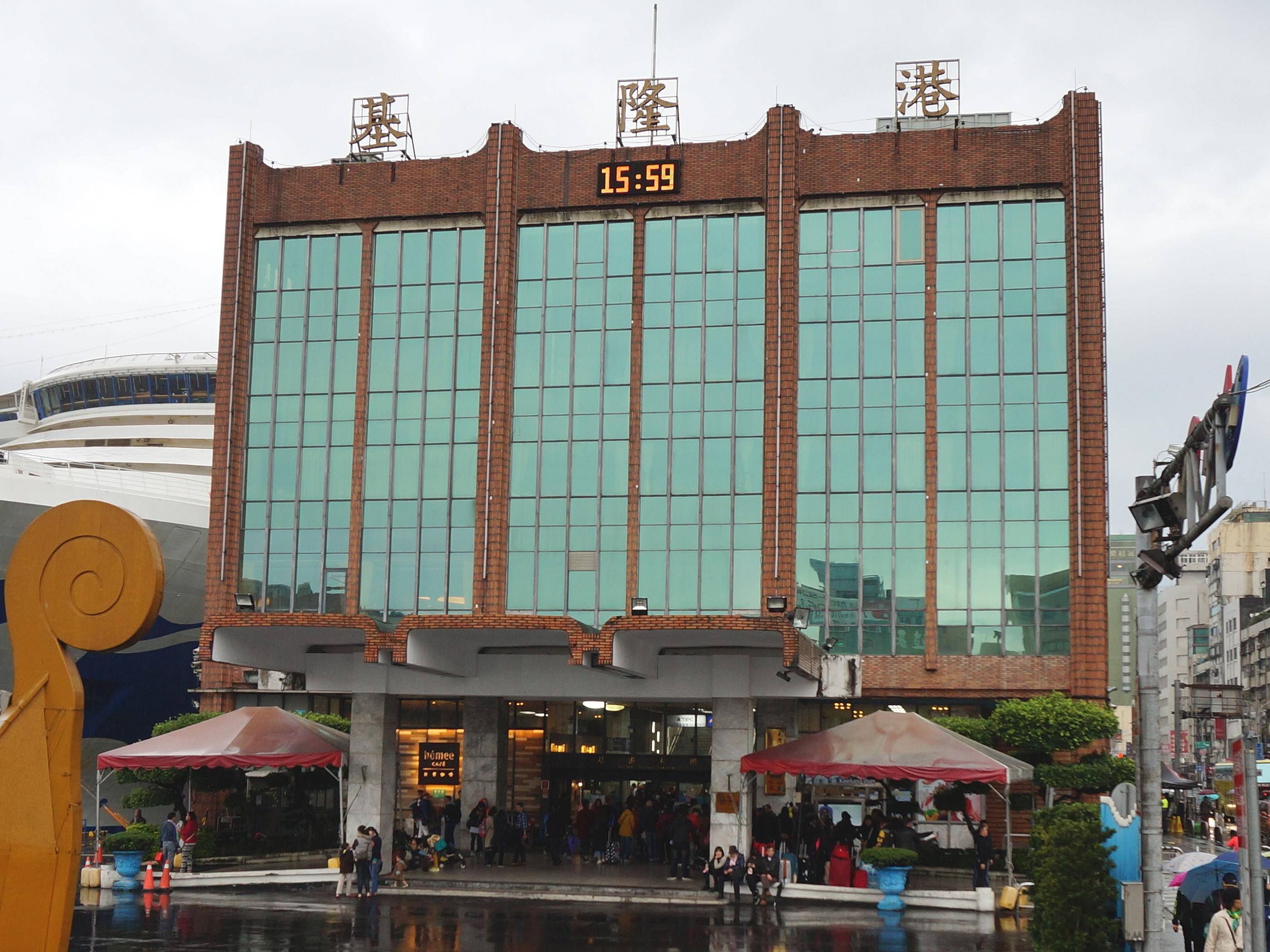 臺灣港務公司基隆港務分公司基港大樓。